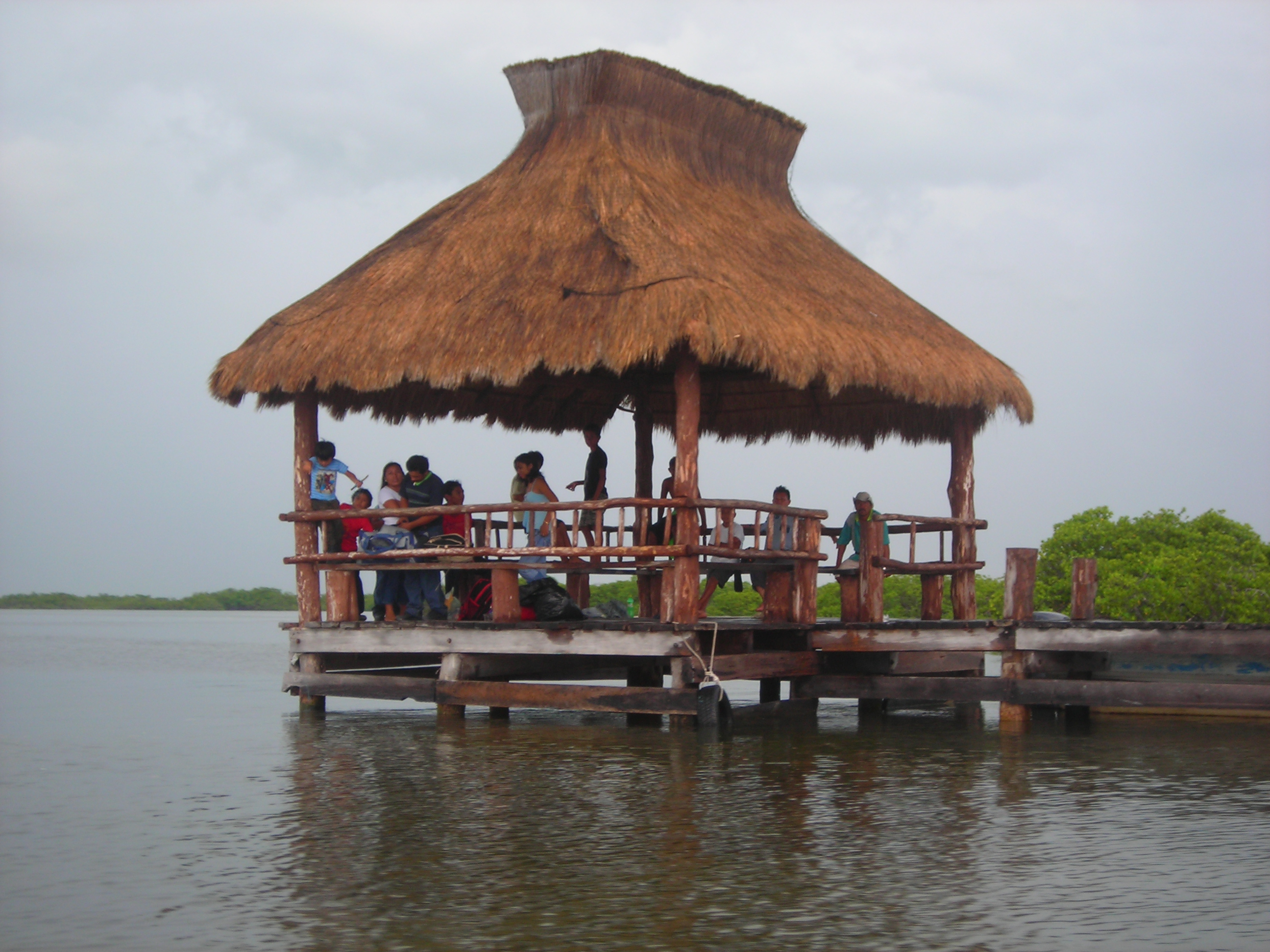 Capanno di approdo barche all'interno della Riserva